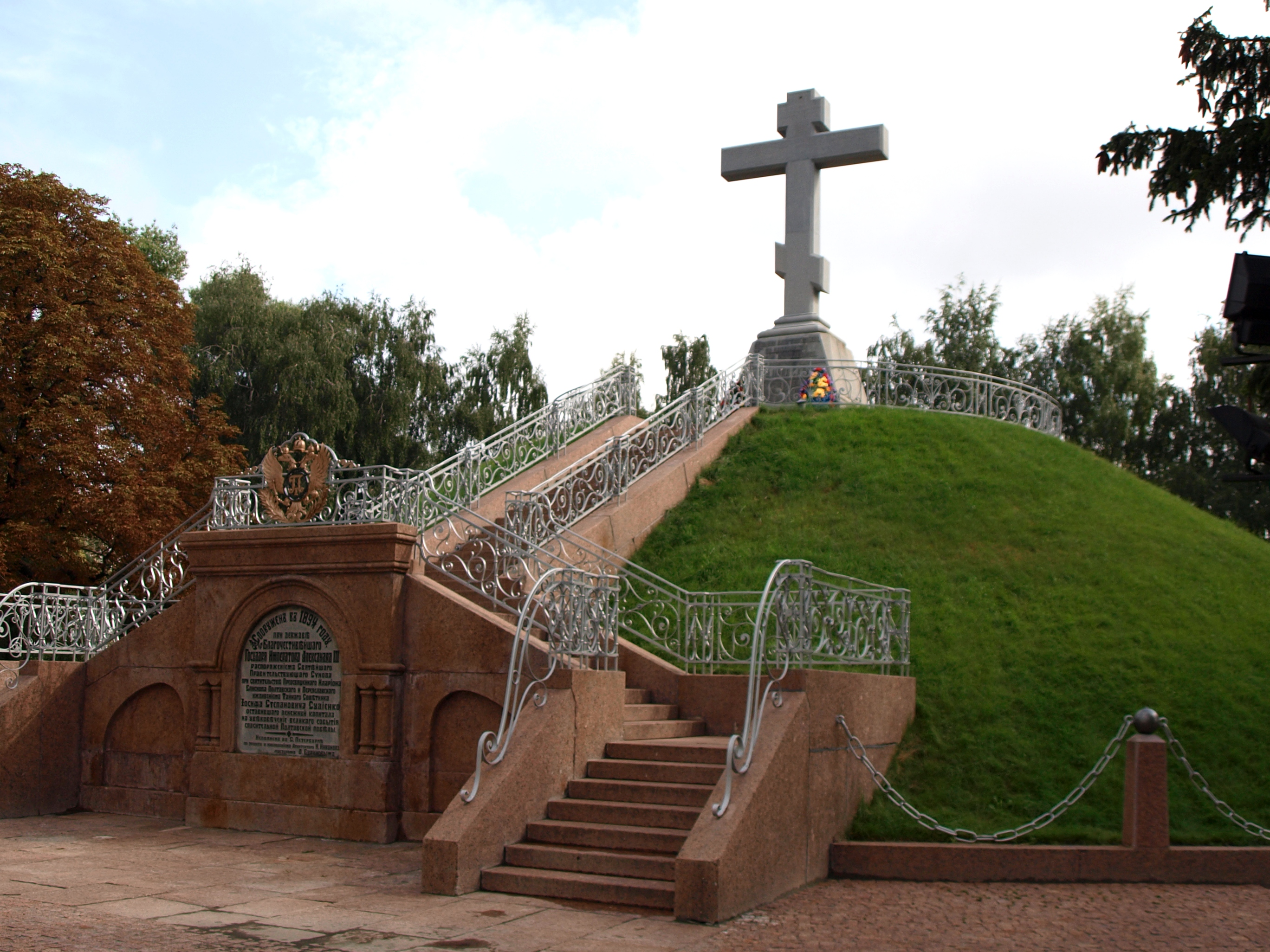 Памятник погибшим в Полтавской битве русским воинам